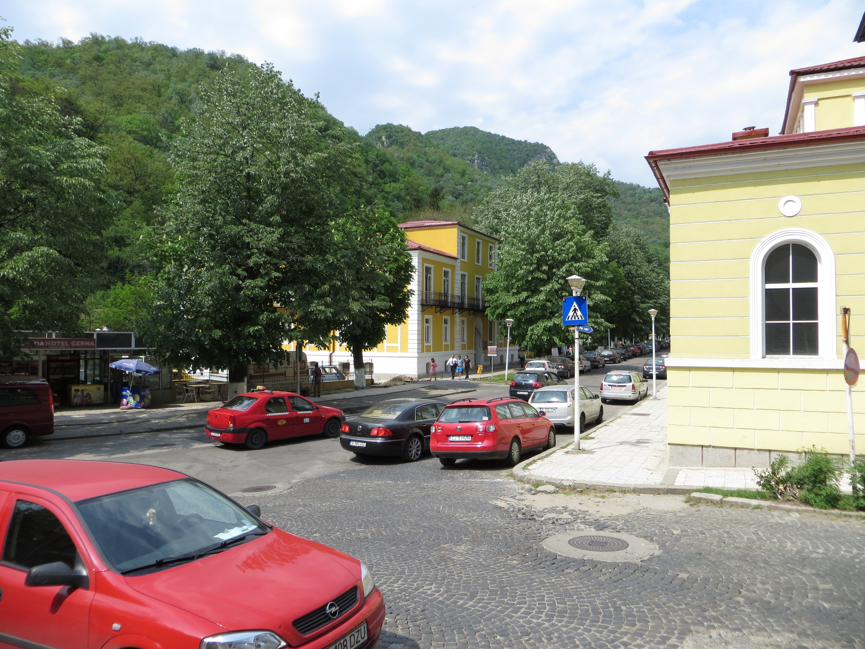 Pavilionul de hidroterapie, cu bazin termal deschis